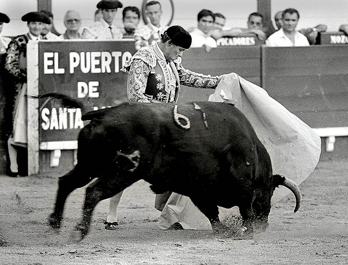 Curro Romero toreando a la verónica en el Puerto de Santa María